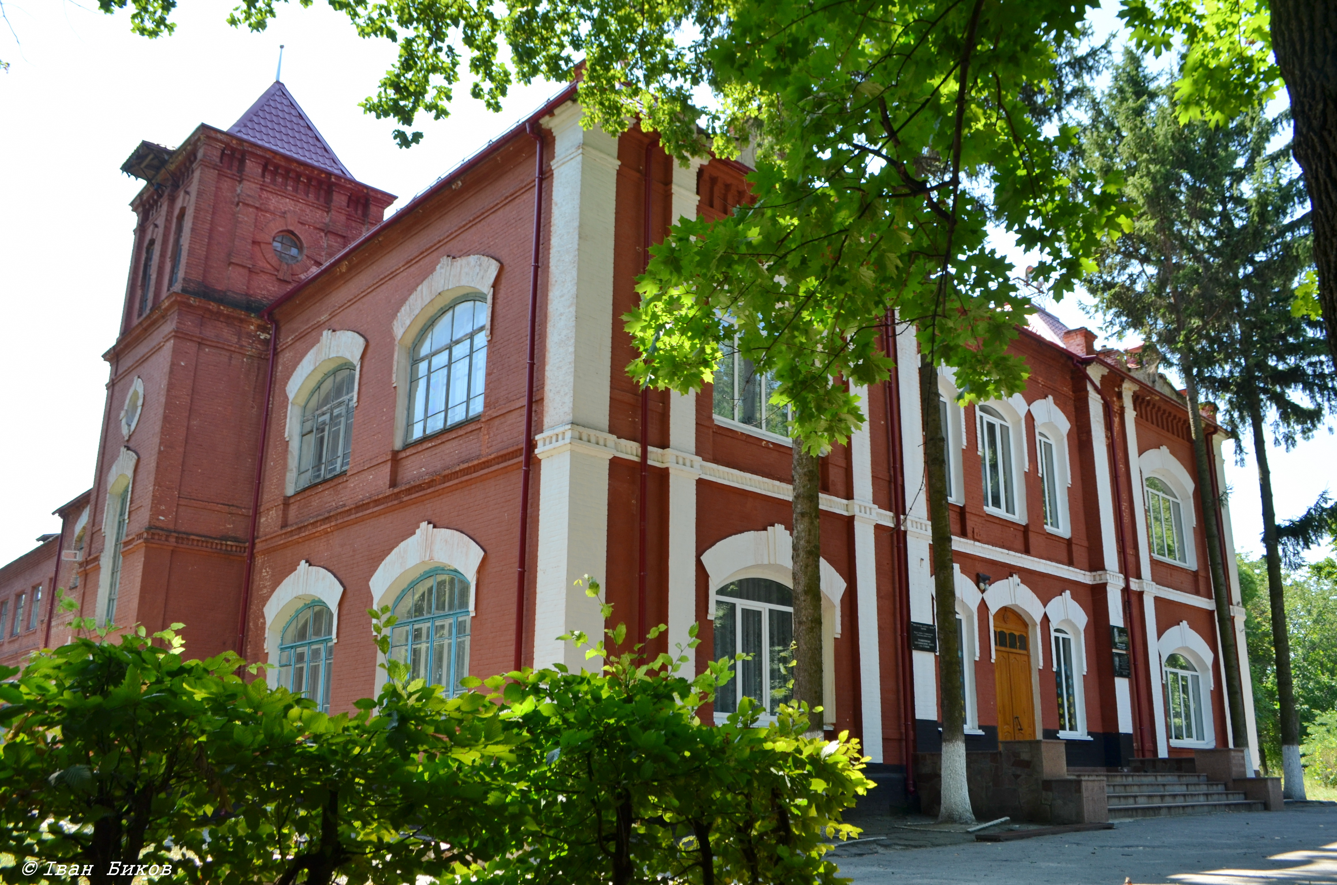 Розкішнянська ЗОШ I-III ступеня, село Розкішна, вул. Червоноармійська 7